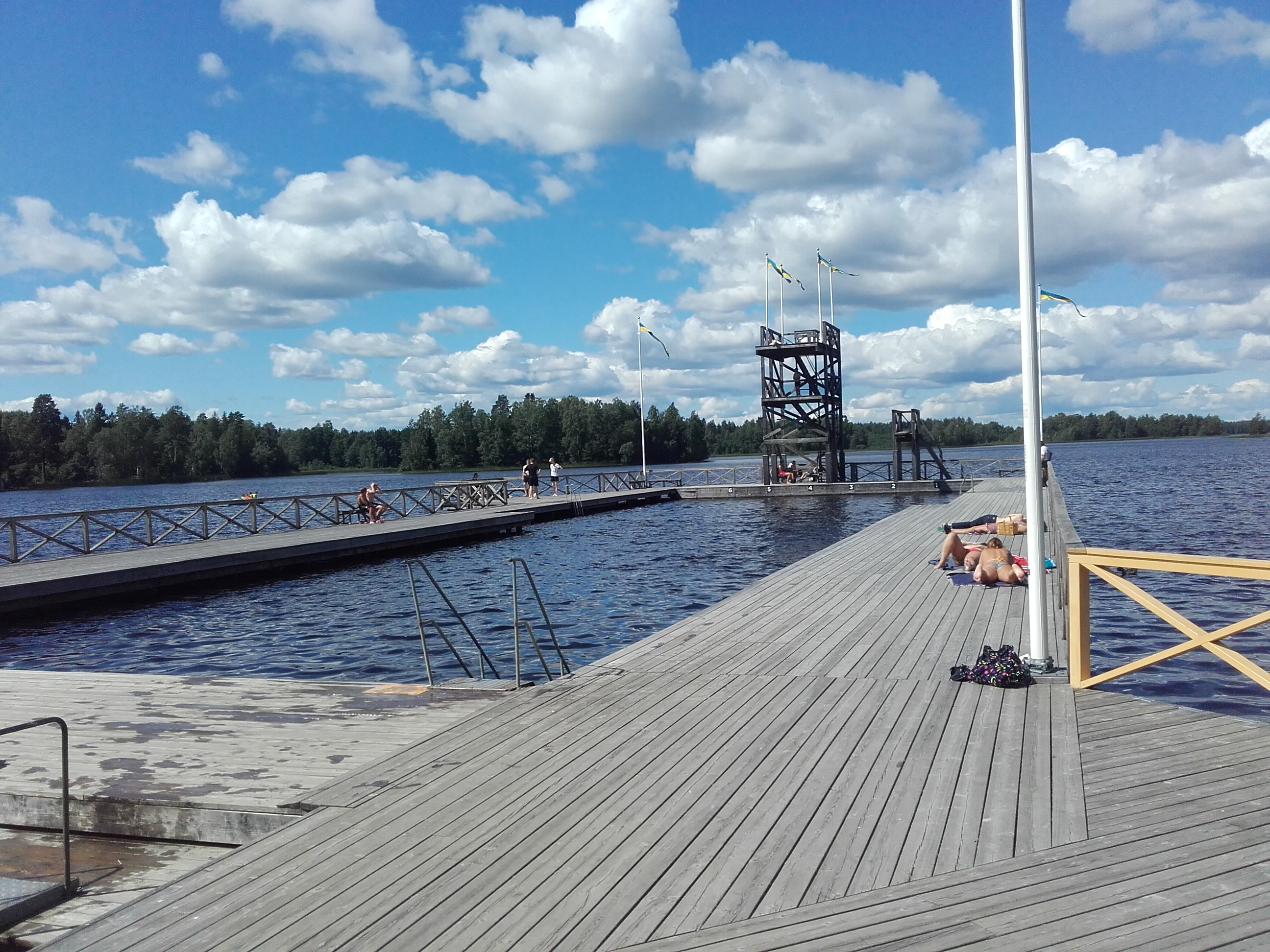 Kallbadhuseta bassäng